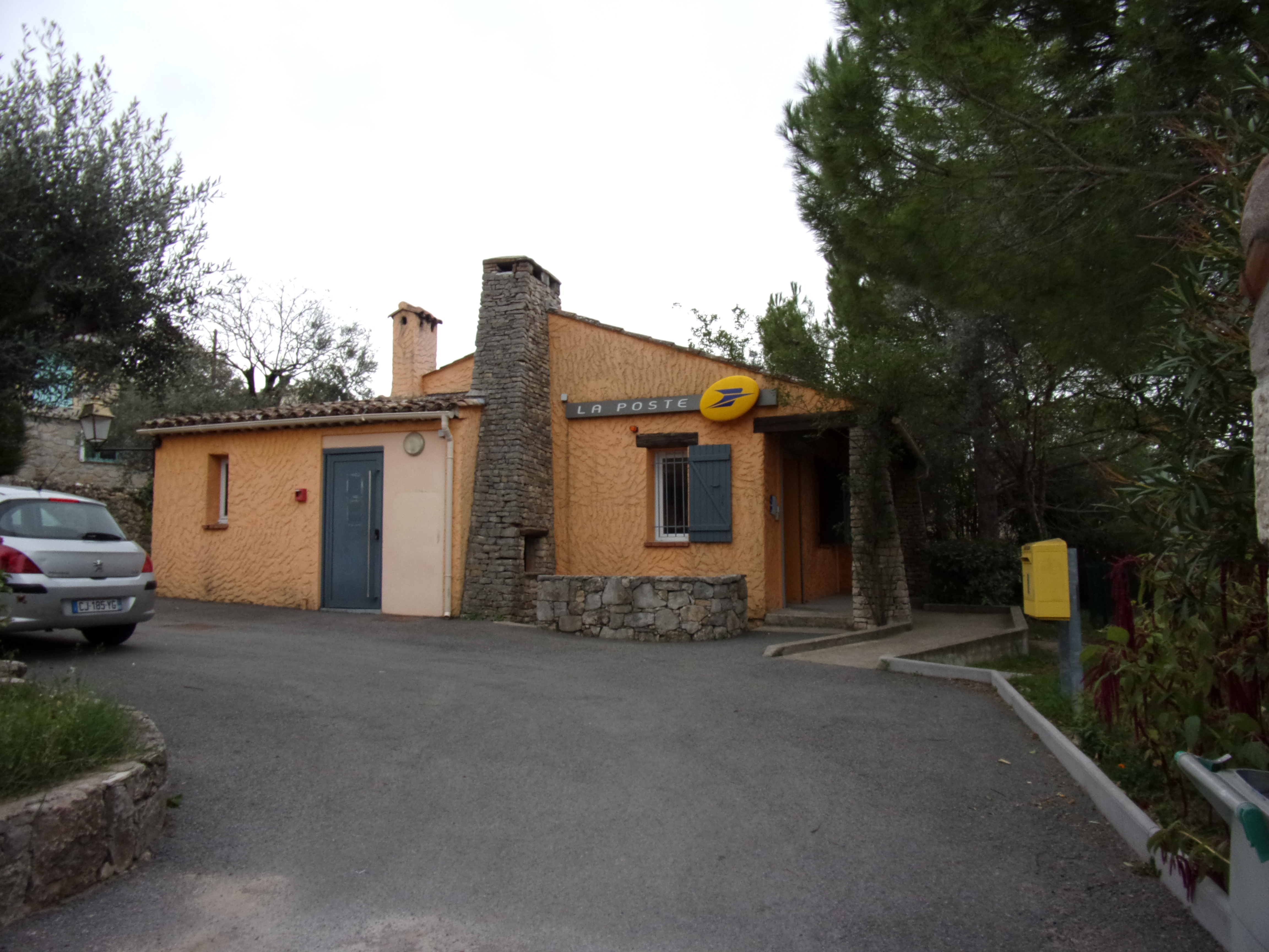 Bureau de Poste de Saint-Paul-en-Forêt